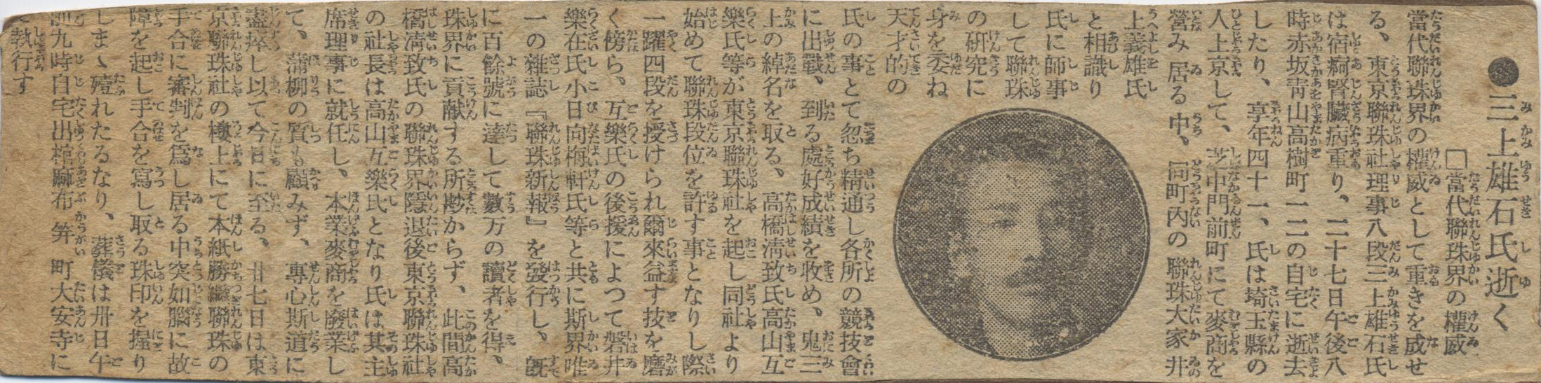 三上雄石の逝去を伝える記事